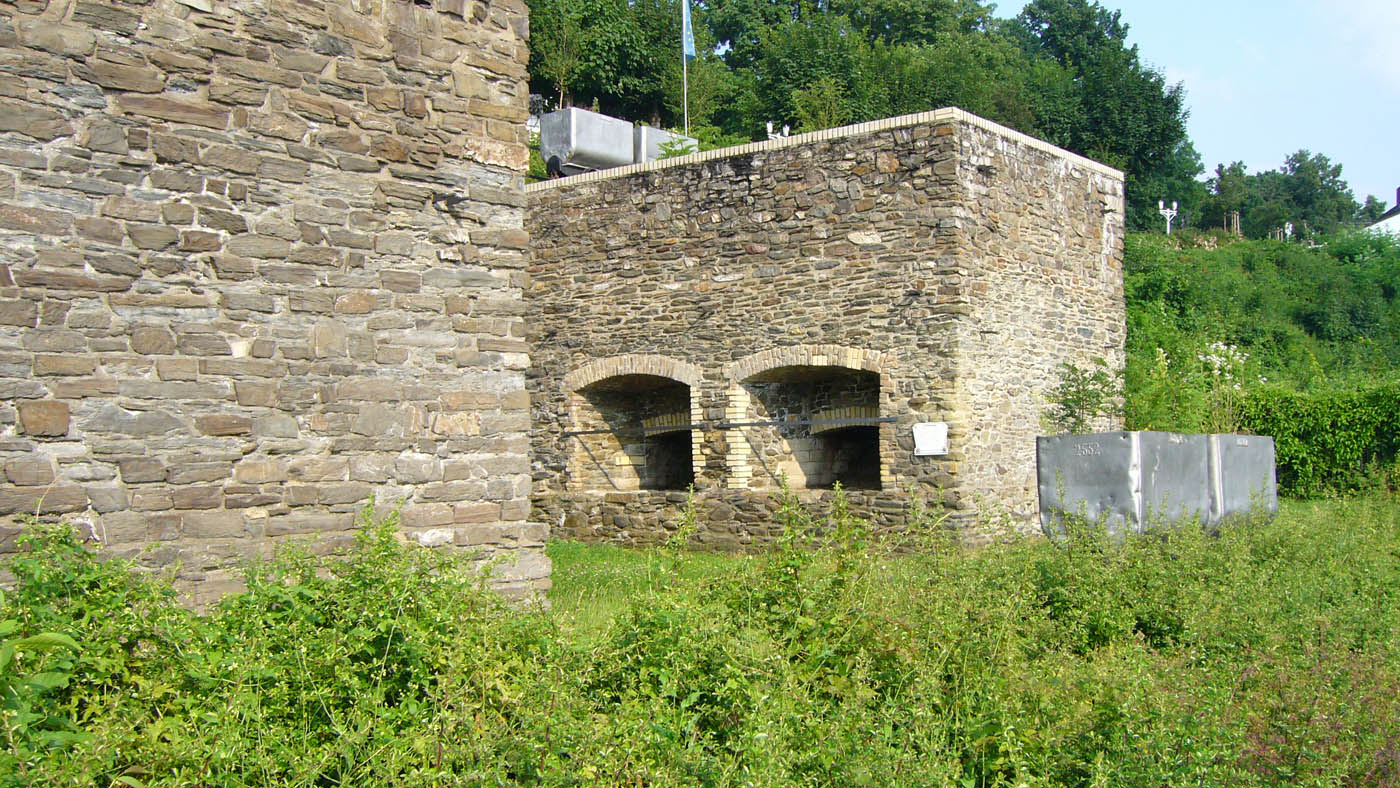 Erzröstofen Bendorf